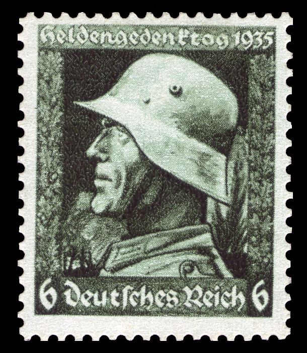 Stamp description / Briefmarkenbeschreibung